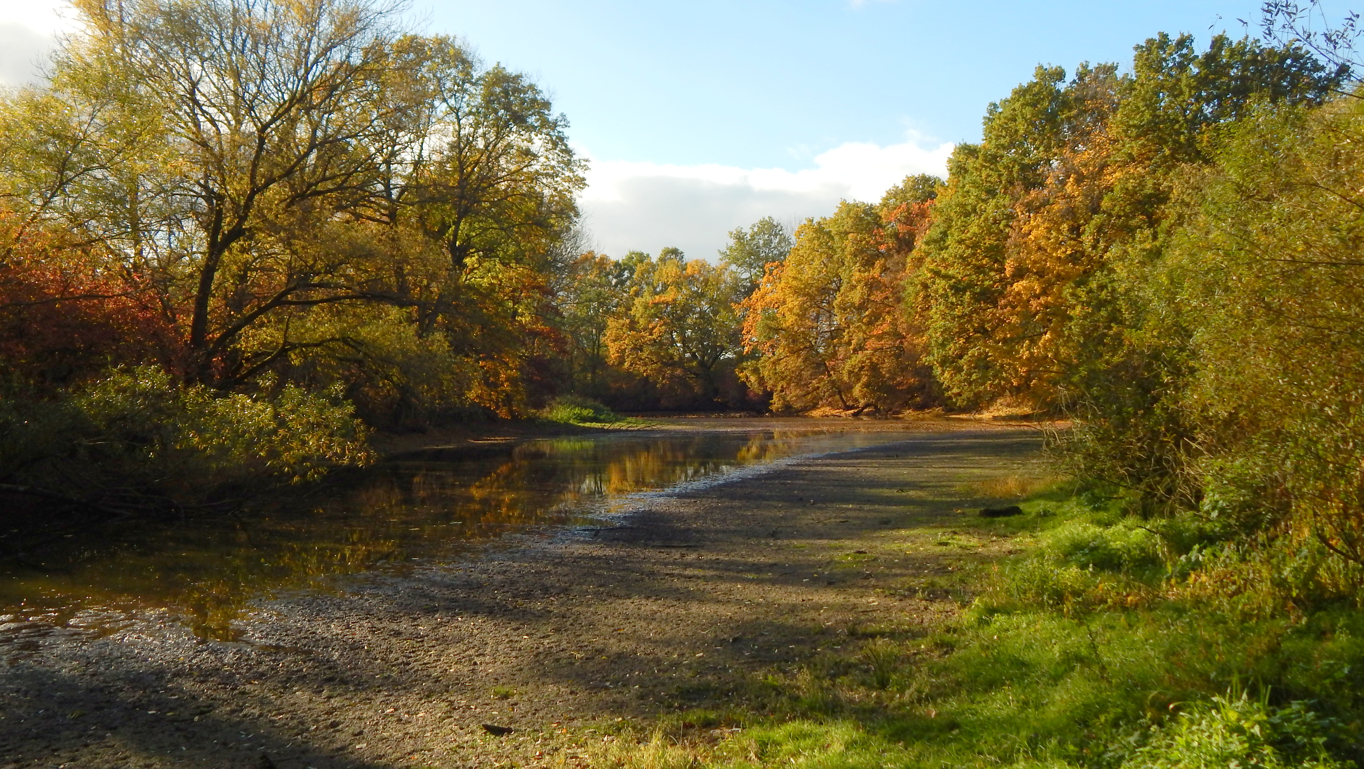 Tůň u Hrobic.